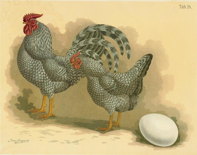 Dominikaner-Huhn. Gallus dom. americanus undulatus. Dominiques.